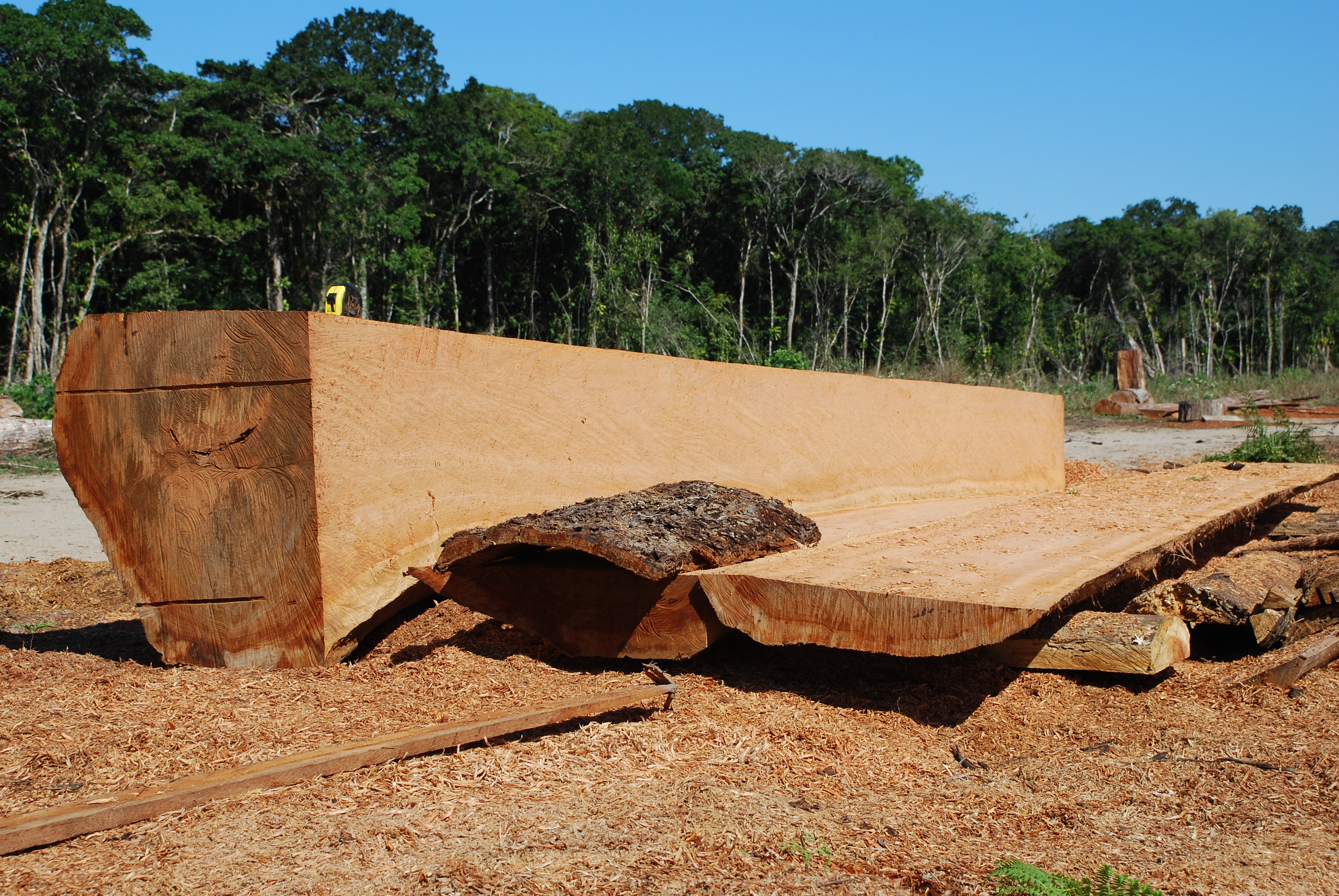 Guanandi trunk